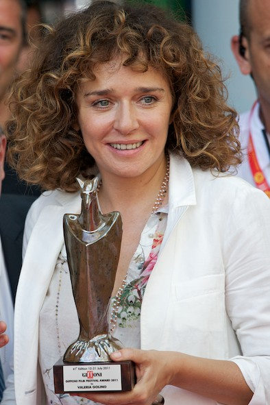 Valeria Golino al Giffoni Film Festival 2011 con il premio, opera realizzata dal gruppo SCU8